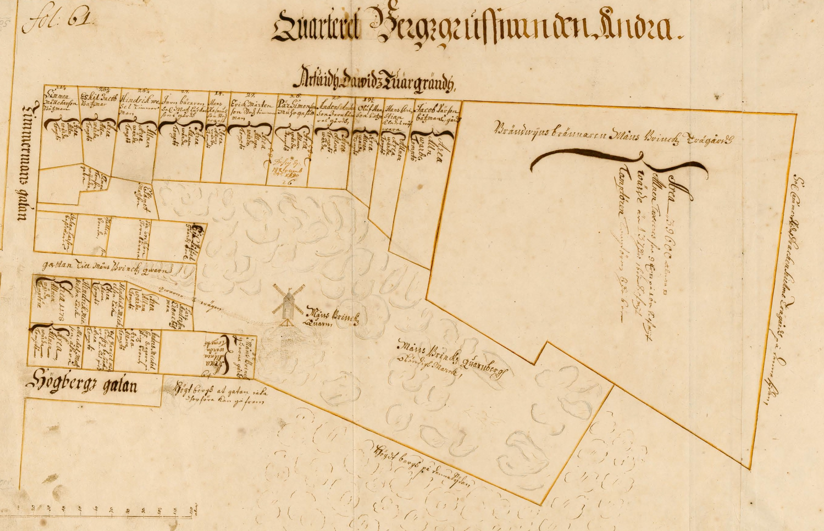 Måns Brincks kvarn och omgivning i Holms tomtbok 1679